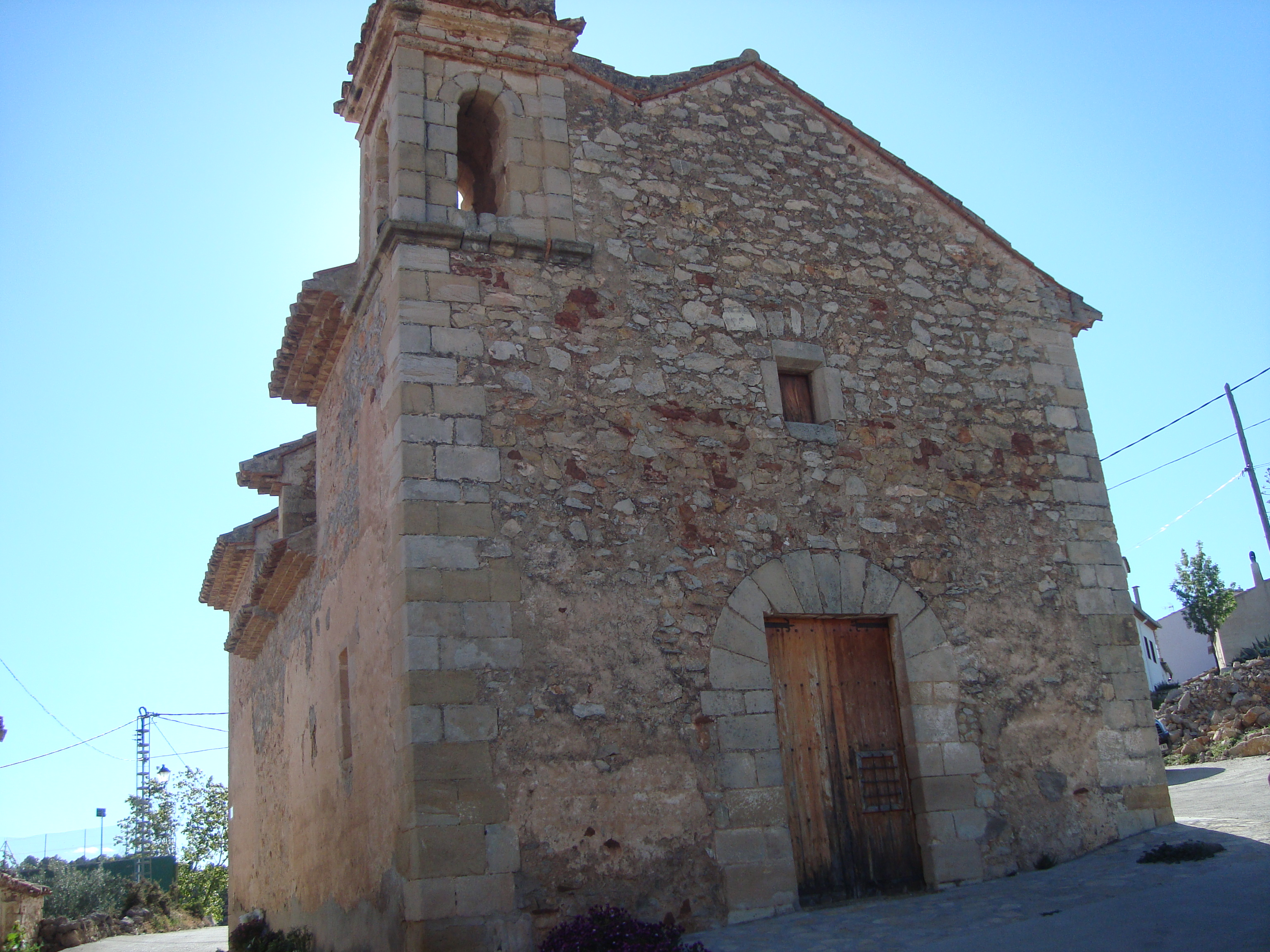 Ermita de Santa Bàrbara (Sucaina) 08.142-005.